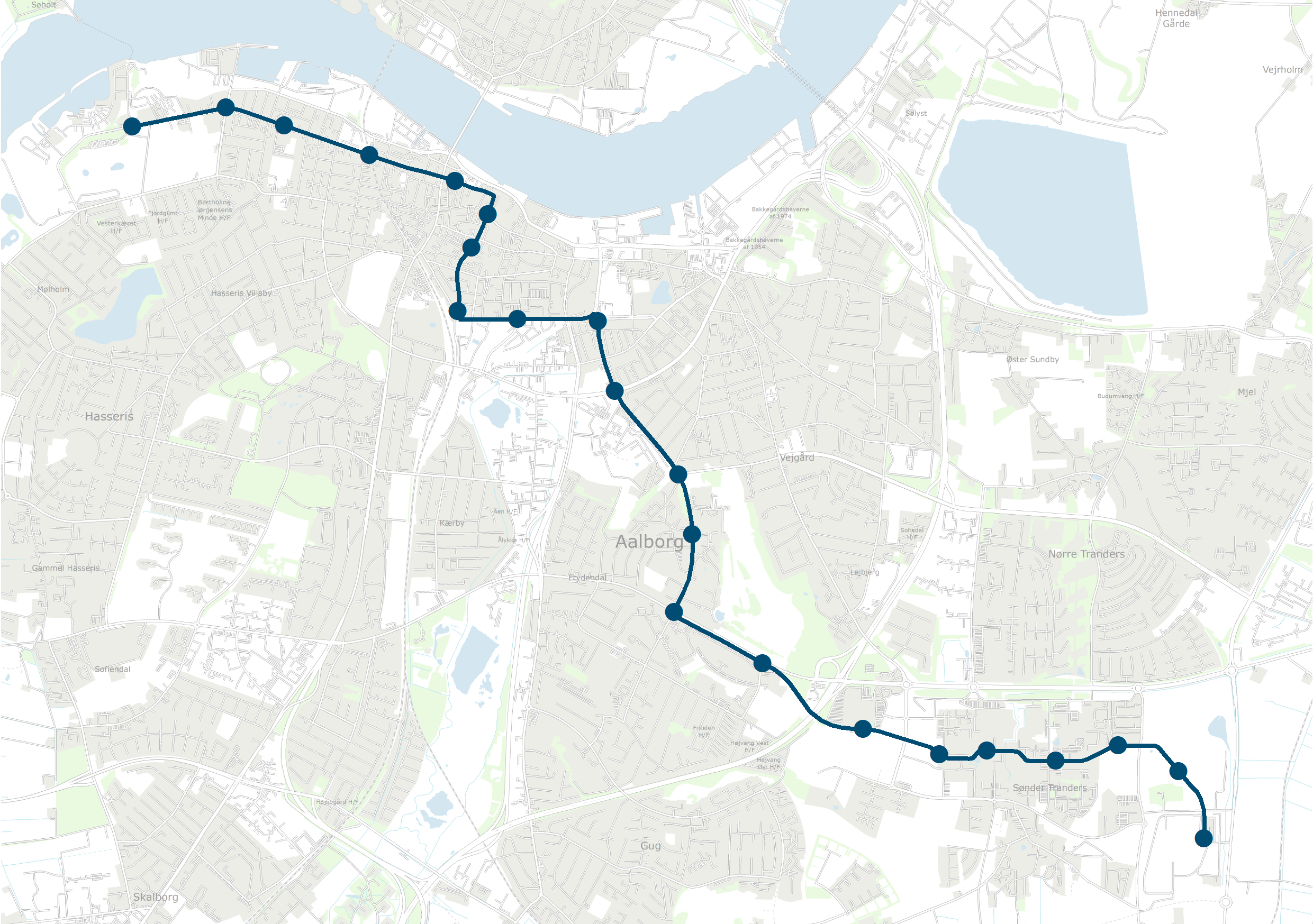 Linjeføring for +Bus Aalborg